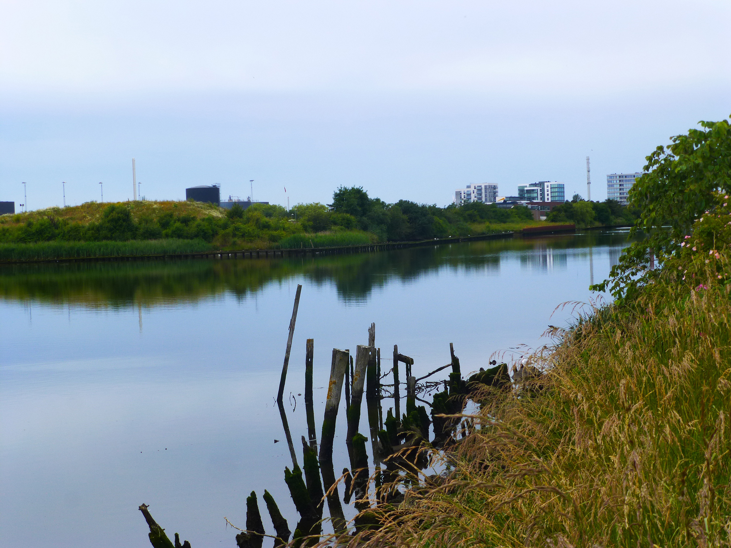 Bygholm Ås udløb i Horsens Fjord i Horsens